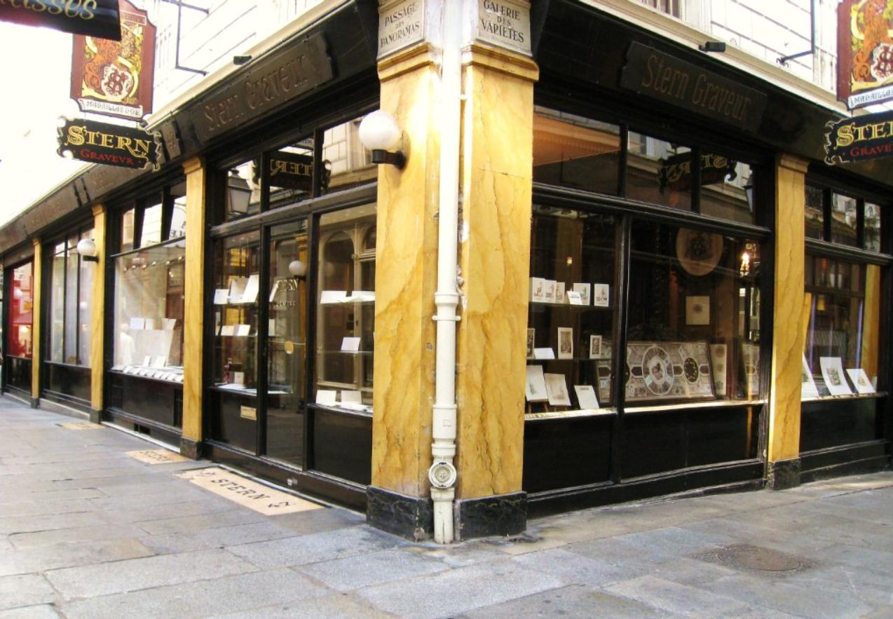 Boutique Stern, graveur à Paris depuis 1836. La façade et l'intérieur de la boutique du Passage des Panoramas, datant de 1840, sont inscrits au titre des monuments historiques depuis le 7 juillet 1974 ; la boutique du graveur Stern l'est depuis le 10 juillet 2009.